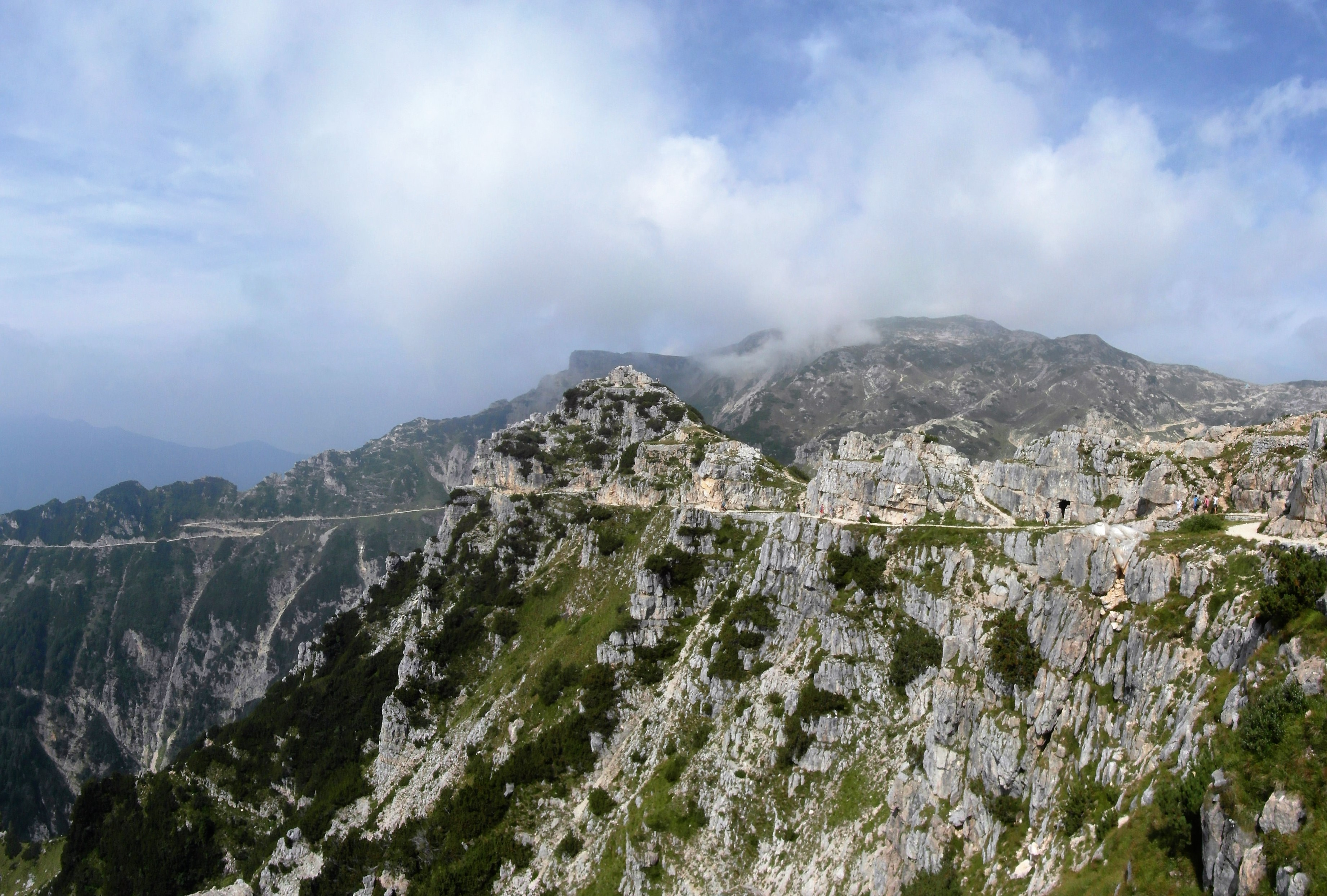 Strada degli Eroi